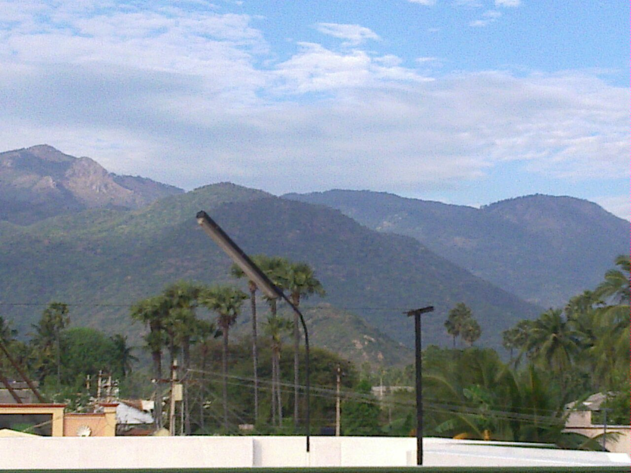 ஏற்காடு மலை